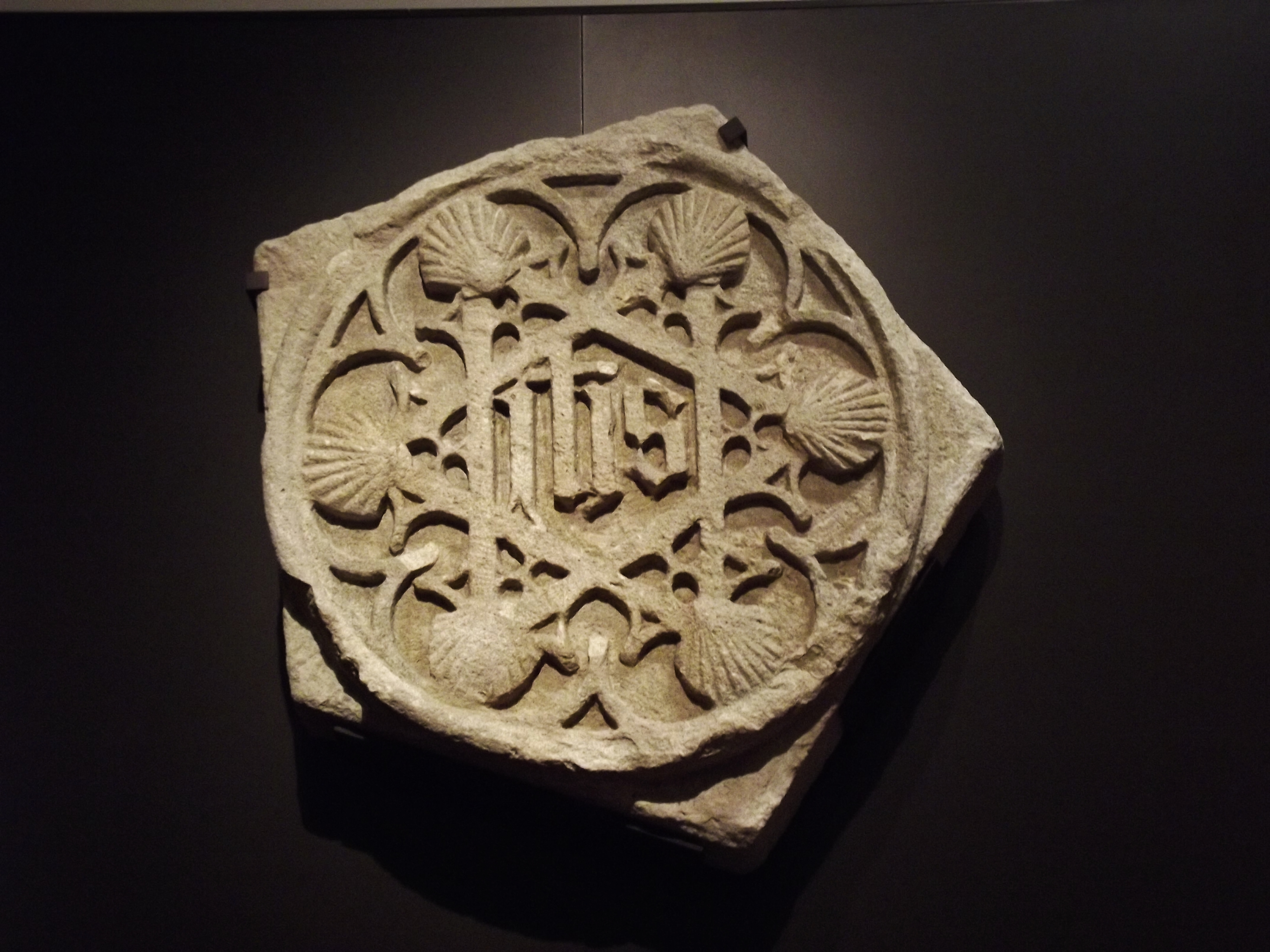 Clave del castillo de Galve de Sorbe